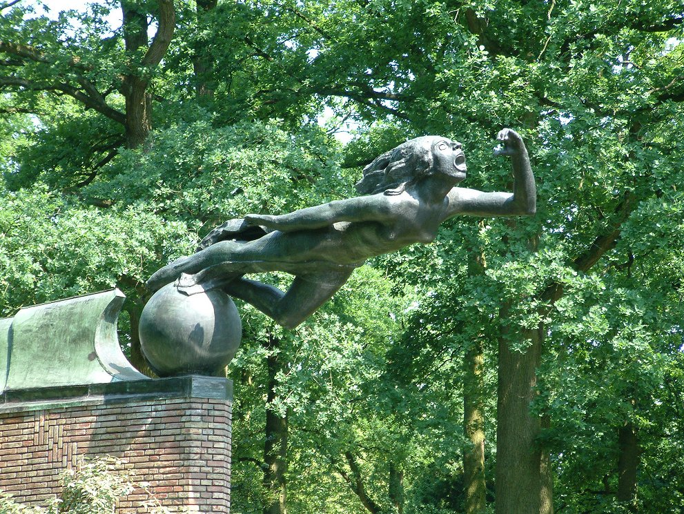 Radiomonument (1936) in Eindhoven, in het stadswandelpark. Rijksmonument, gebeeldhouwd ter herinnering aan de eerste radioverbinding tussen Nederland en Nederlands-Indië in 1927; ontworpen door Dirk Roosenburg samen met beeldhouwer Albert Termote